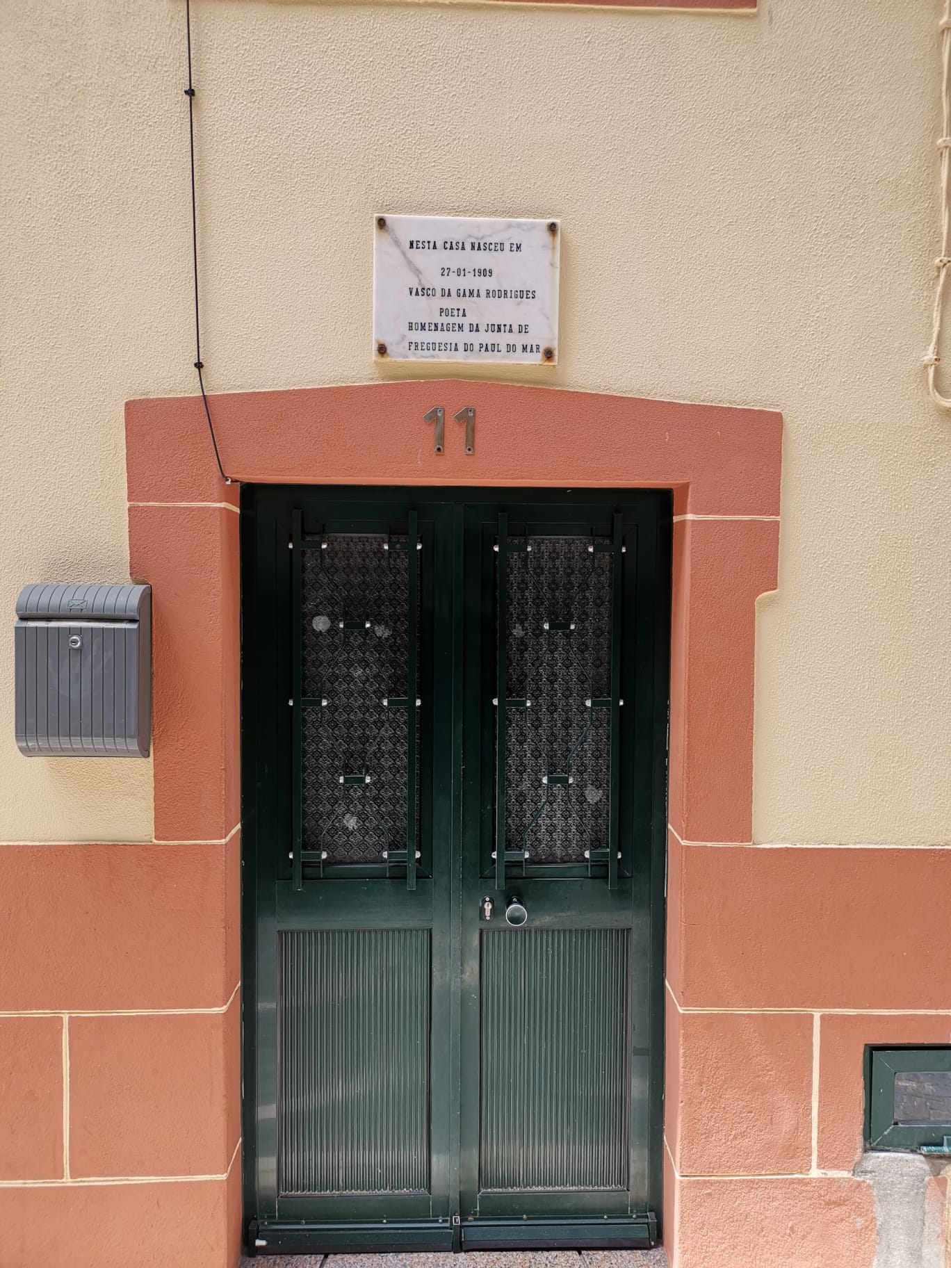 Vasco da Gama Rodrigues (27 de janeiro de 1909, Paul do Mar, Madeira - 3 de maio de 1991), foi um poeta português. Este viveu a sua juventude em Moçambique e aos 20 anos, voltou para Lisboa, onde trabalhou no Departamento de Inspeção Turística de Lisboa. Durante esse tempo, ele começou a escrever e algumas das suas obras foram publicadas. Os seus trabalhos são do estilo de Agostinho da Silva e Álvaro Ribeiro. A 3 de Maio de 2009, a escola de Paul do Mar passou a chamar-se Escola Vasco da Gama Rodrigues, numa cerimónia presidida pelo Secretário Regional da Educação e Cultura, Francisco Fernandes, e organizada pelo Centro Cultural Casa do Povo do Paul.